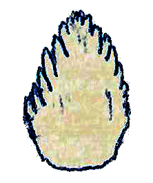 Illustration of a fossil of Phyllodon